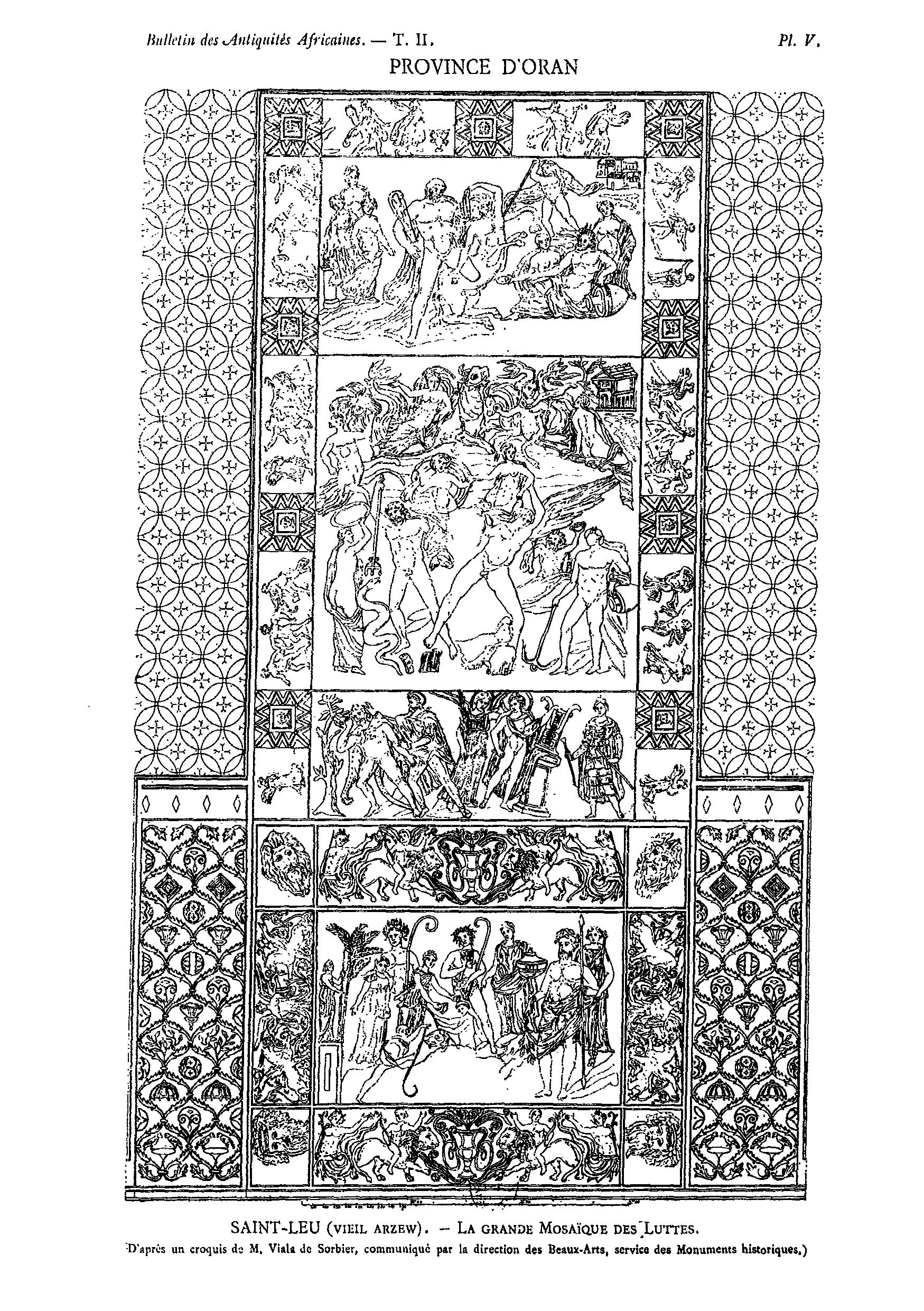 Dessin sur fouilles de M.Viala de Sorbier en 1862,paru dans le Bulletin trimestriel des antiquités africaines - Oran 1884 : Mosaïque dite des luttes à Portus Magnus, Algérie; de haut en bas: Hercule et le centaure Nessus; Neptune frappant un serpent d'un trident; Apollon et Marsyas; lutte entre deux jeunes bergers entourés de divers personnages.